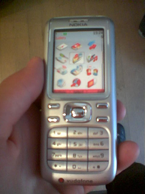 Photo d'un nokia 6234